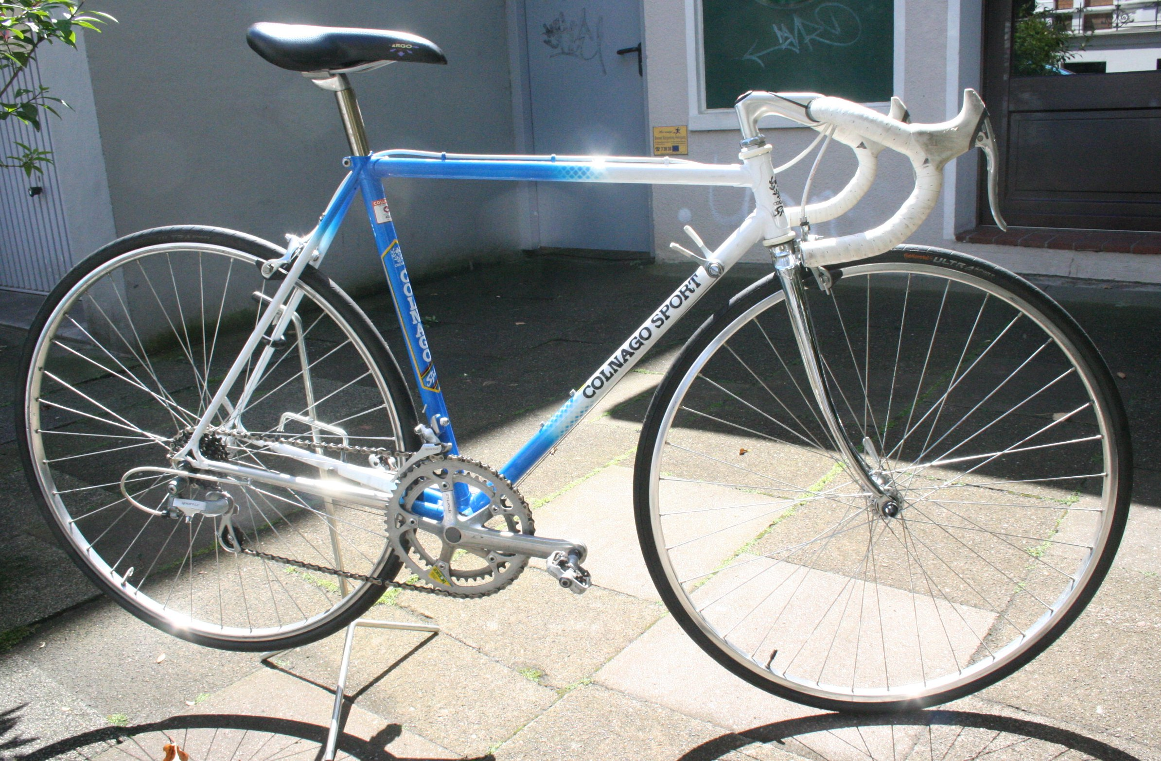 "Colnago Sport" Roadbike